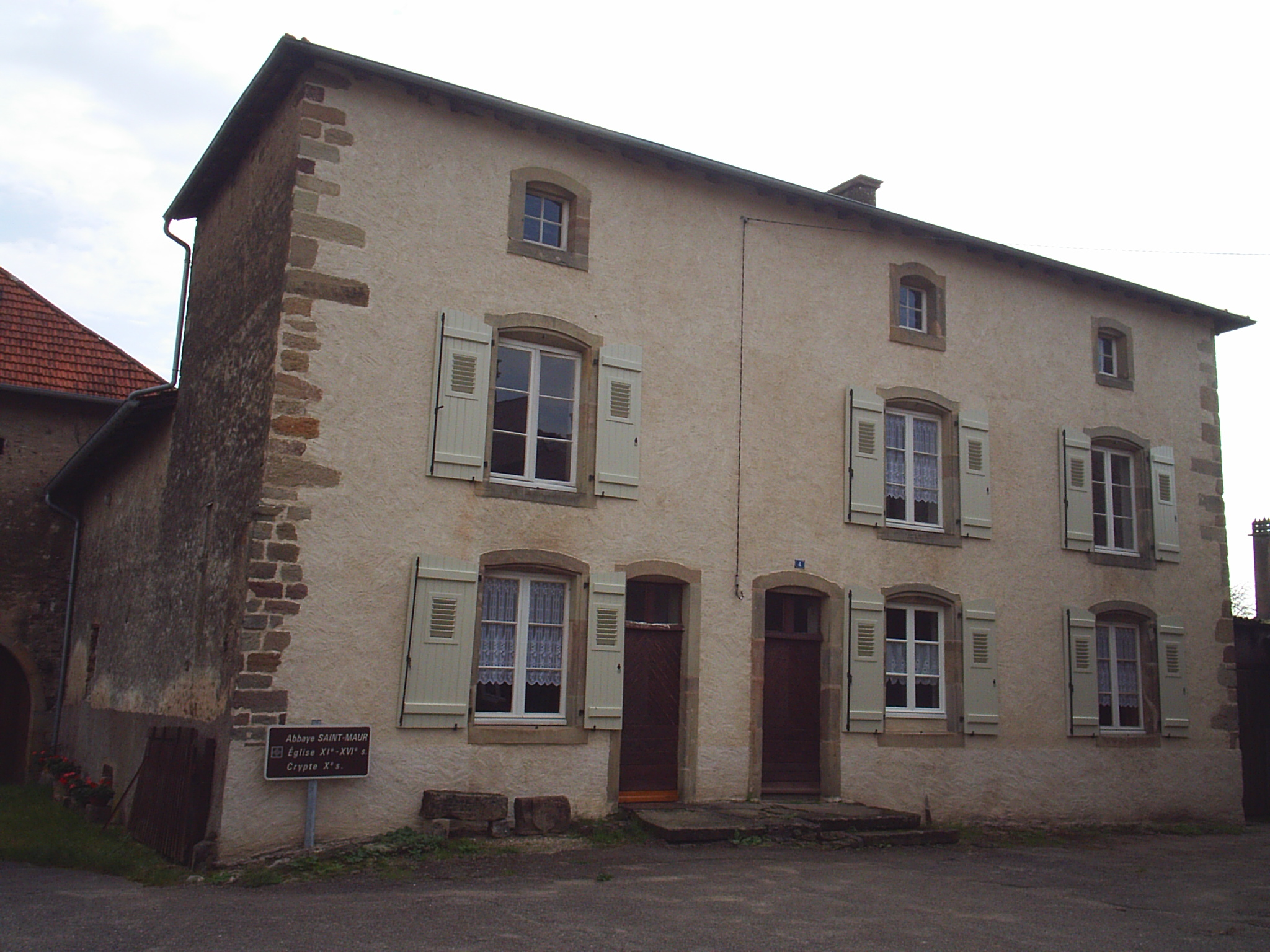 Prieuré Saint-Bathaire de Bleurville (XVIIIe s.)